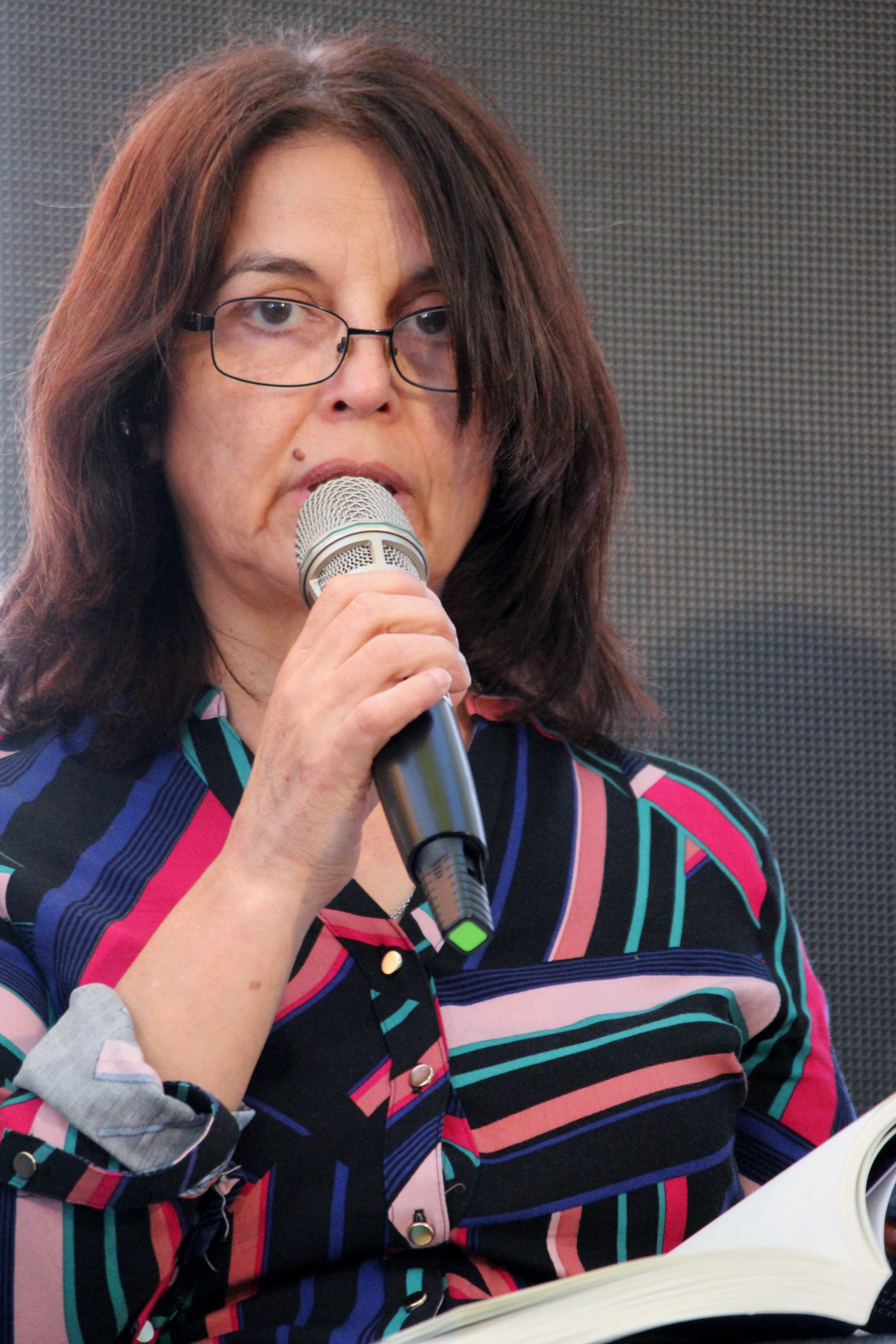 La poeta chilena Isabel Gómez durante la presentación de la Antología de poesía chilena / Volumen III. La generación post 87: otra vuelta de tuerca (compiladores: Teresa Calderón, Lila Calderón, Thomas Harris) en la segunda etapa del Festival de Autores de Santiago 2018 realizada en el GAM.